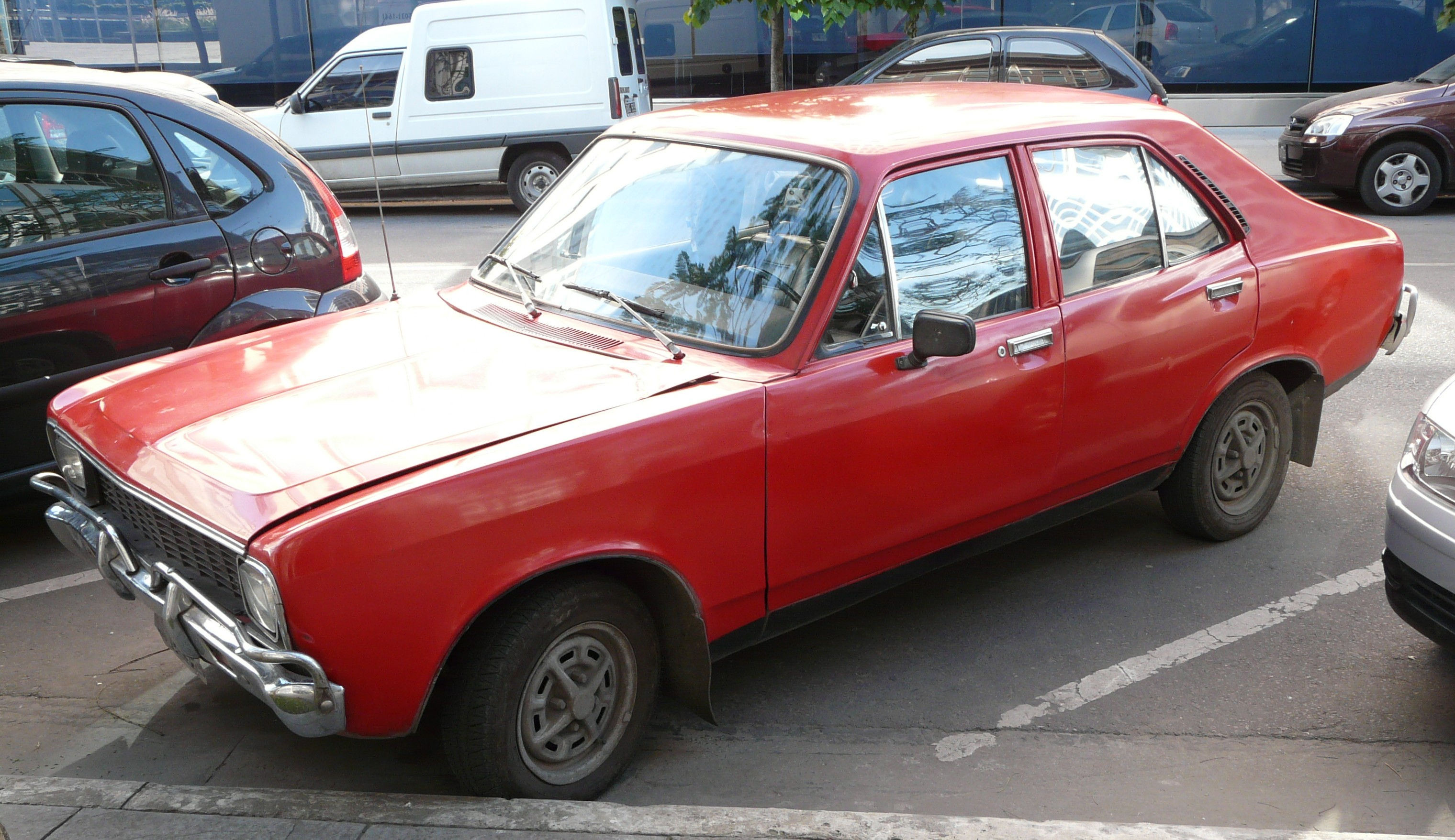 Dodge 1500 (1971-1977 model), Buenos Aires, Argentina, November 2008.